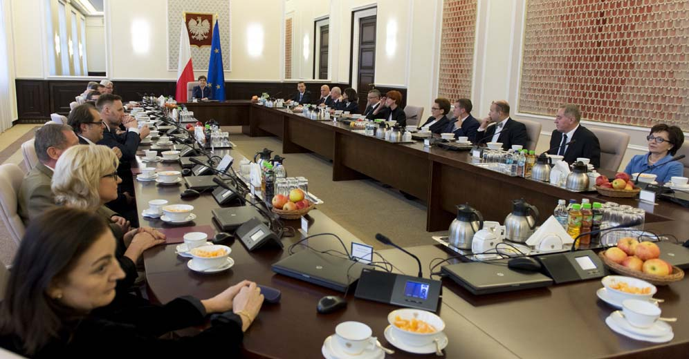 Pierwszy dzień rządu Beaty Szydło.